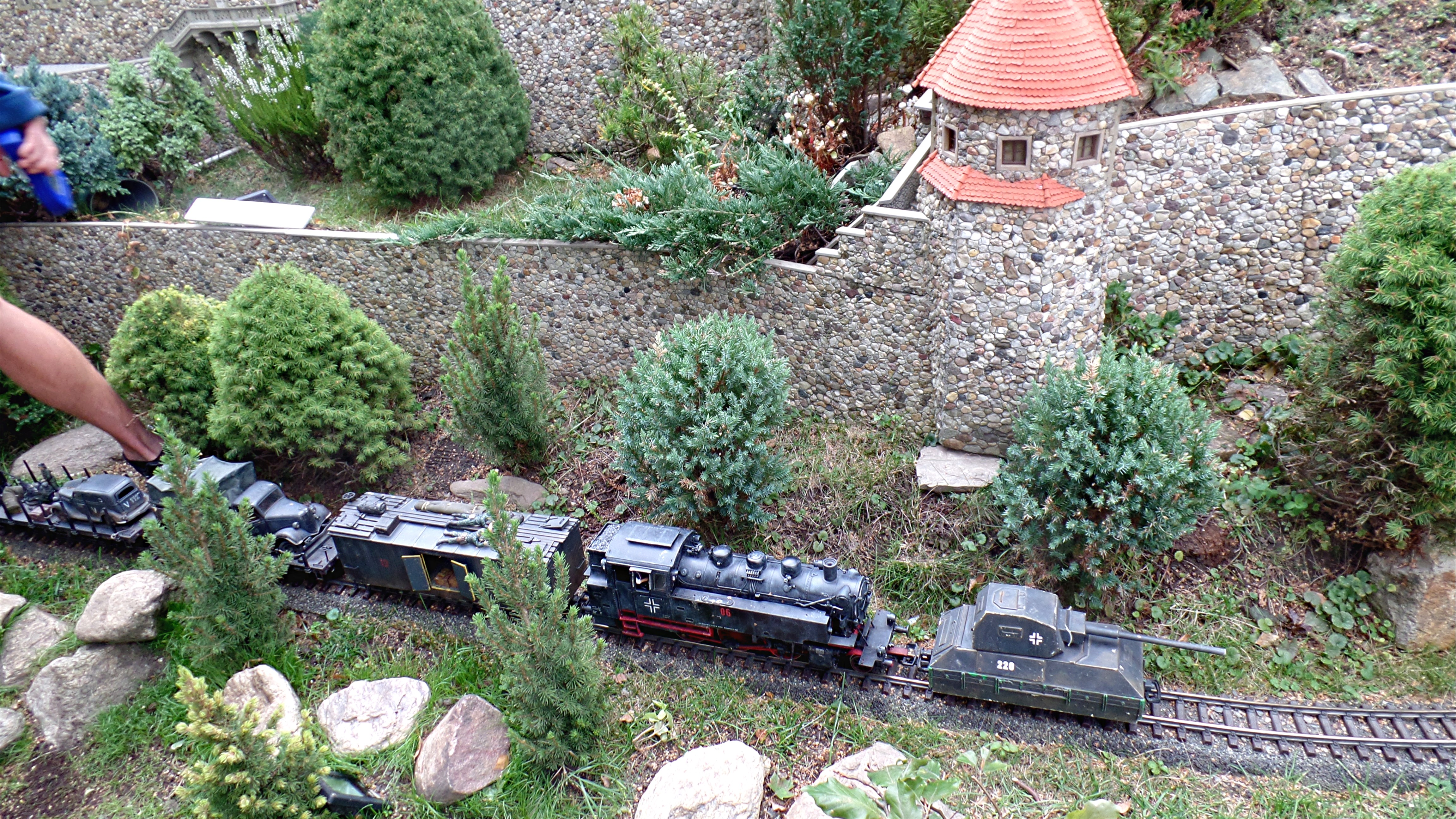 Goldpanzerzug im Miniaturpark von Kowary